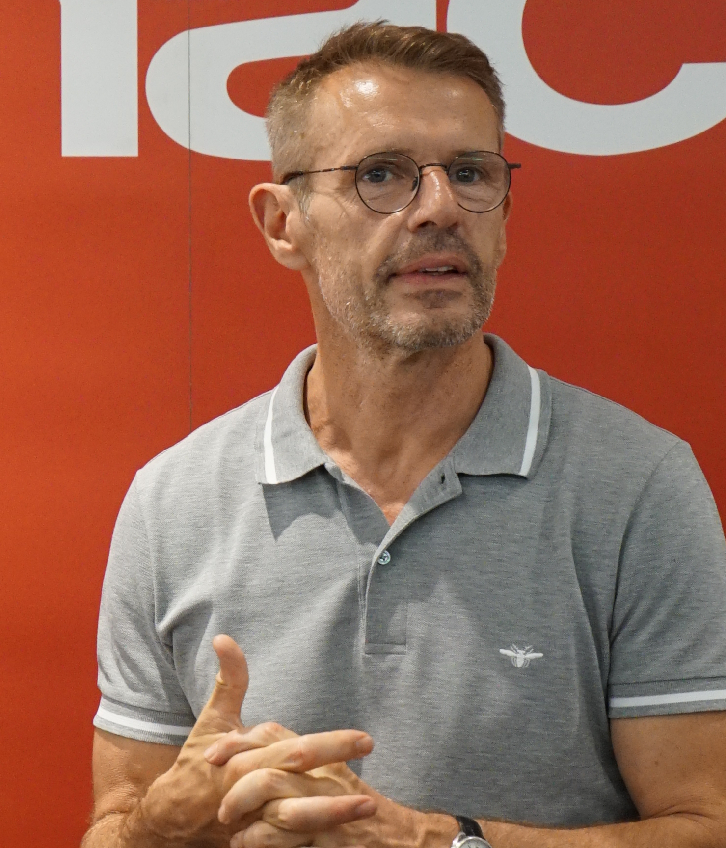 rencontre Wilson/Collard lors des Flâneries musicales de 2017.